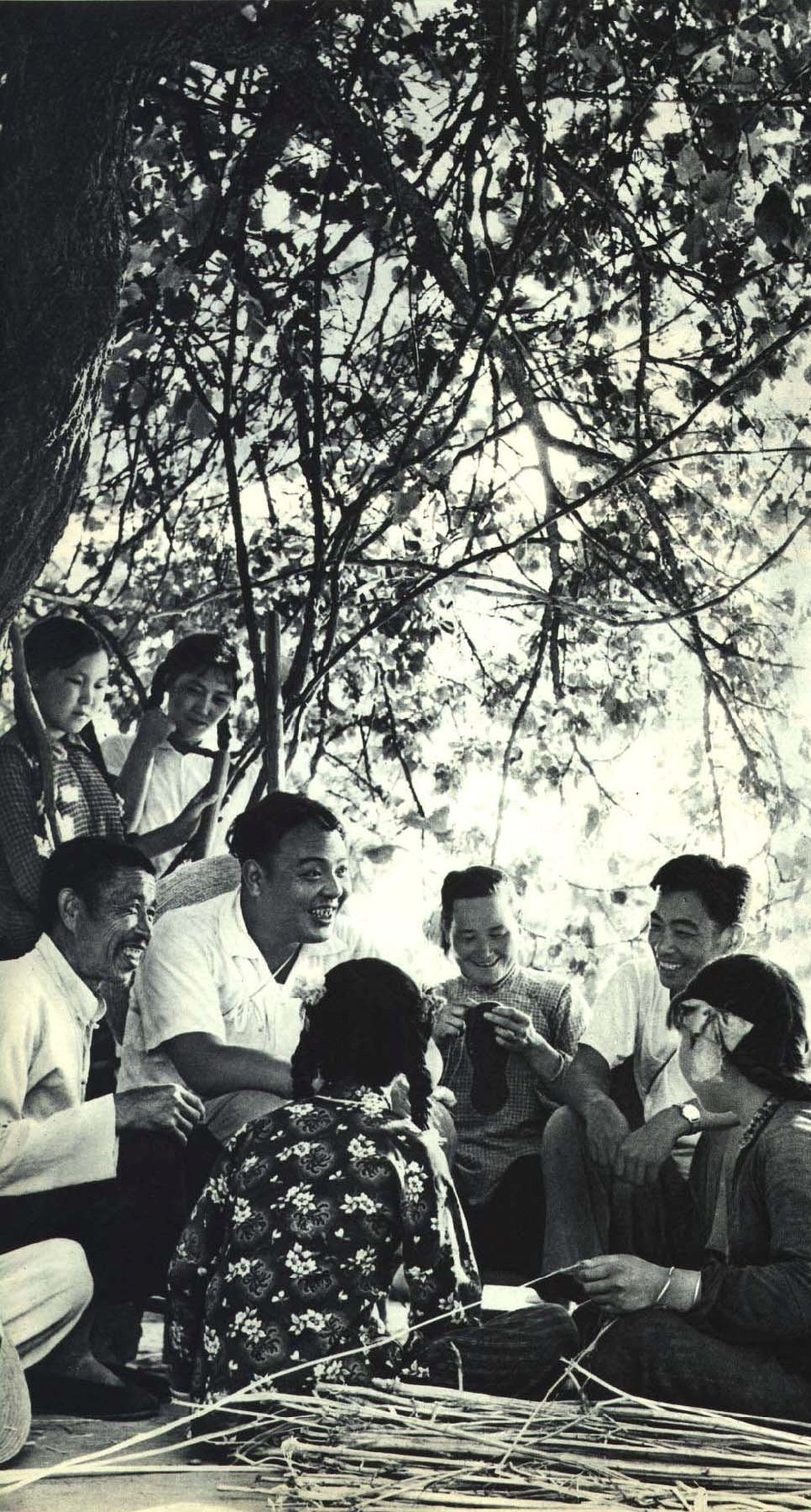 1963-10 1963年 李准 左二